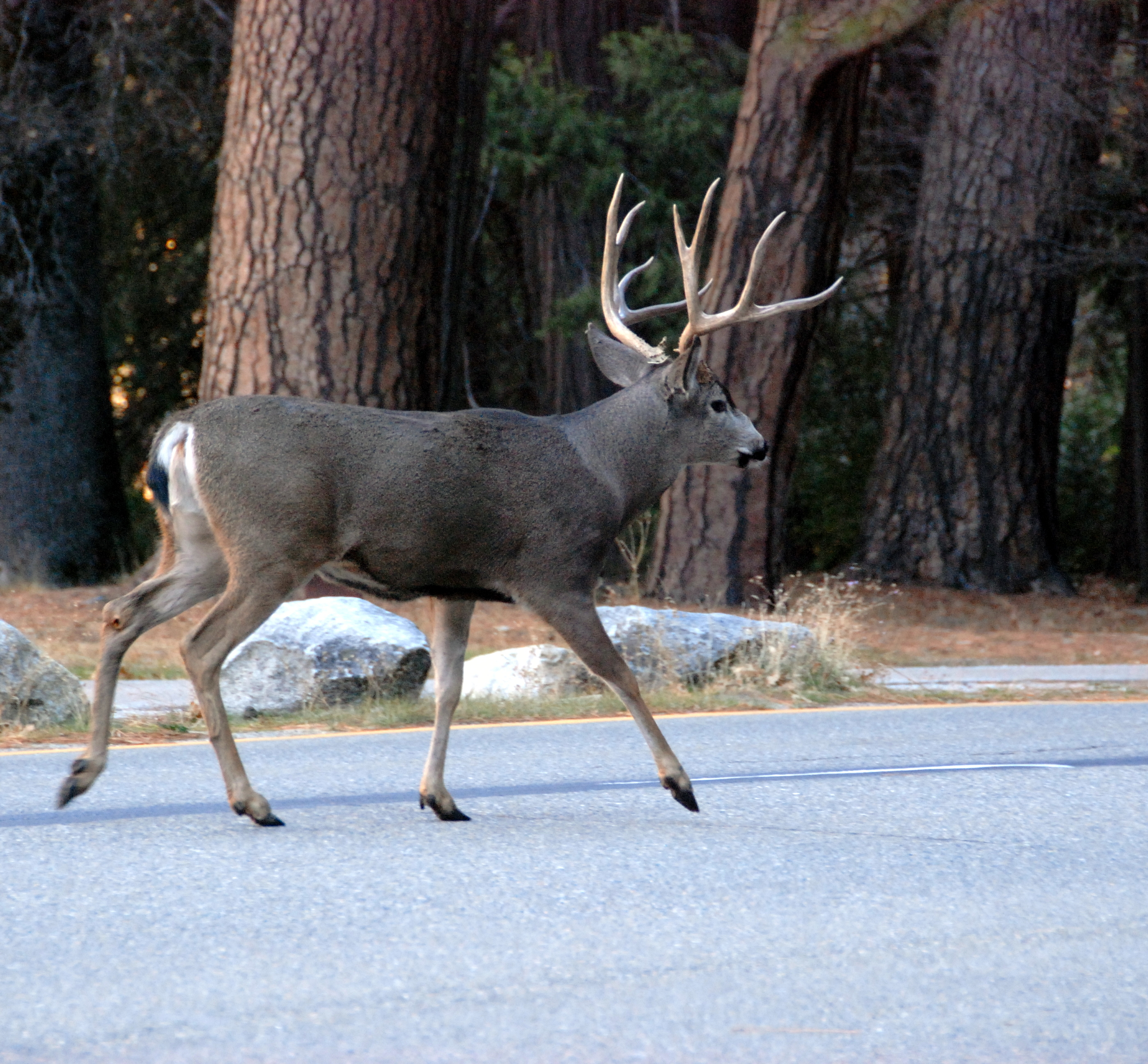 Mule deer on Yosemite Valley floor